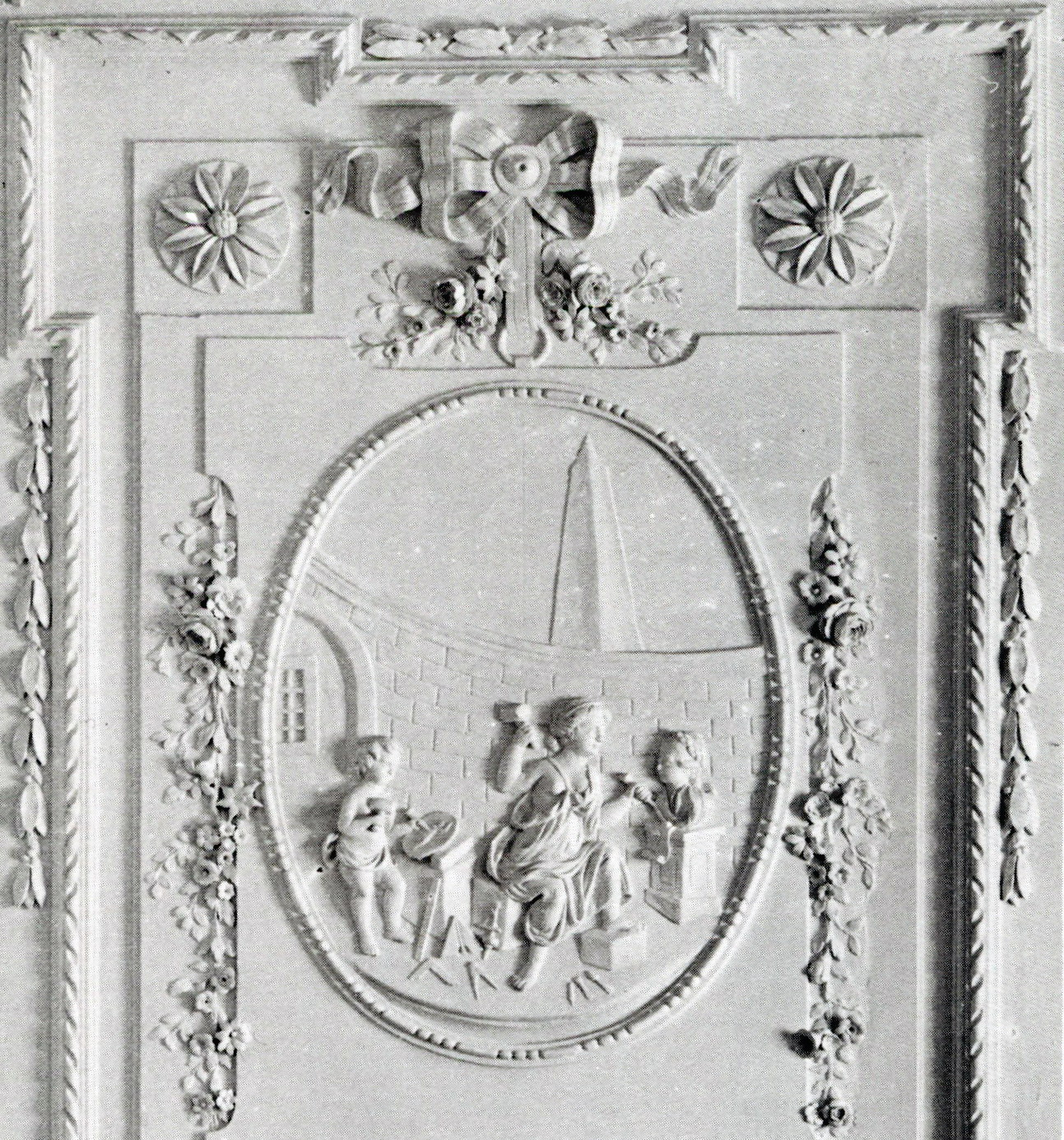 Detail sierstucreliëf 'Architectura' door P.N. Gagini, Huis Eyll, Maastricht-Heer.